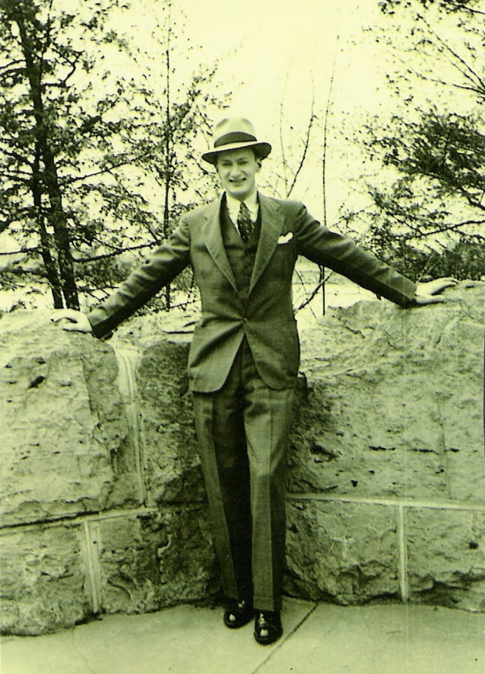 Man in suit